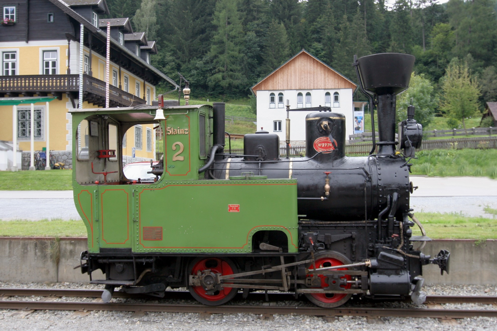 en: Steiermärkische Landesbahnen Narrow gauge steam locomotive No. 2 „Stainz“ in Murau, Styria de: Steiermärkische Landesbahnen Schmalspurdampflok No. 2 „Stainz“ in Murau, Steiermark